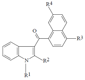 Нафтоилиндолы